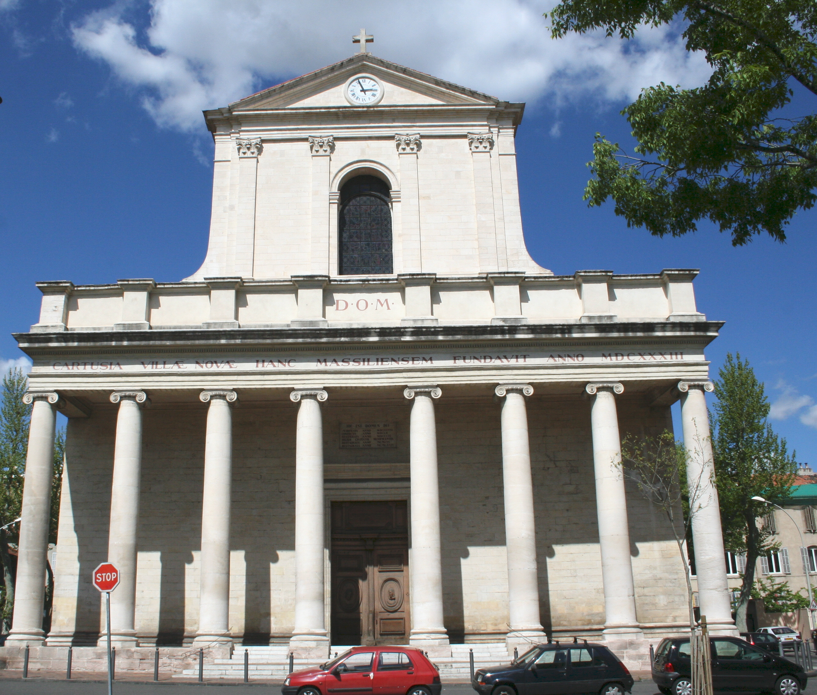 Façade de l'église des chartreux à Maseille, consacée le 11 décembre 1702.